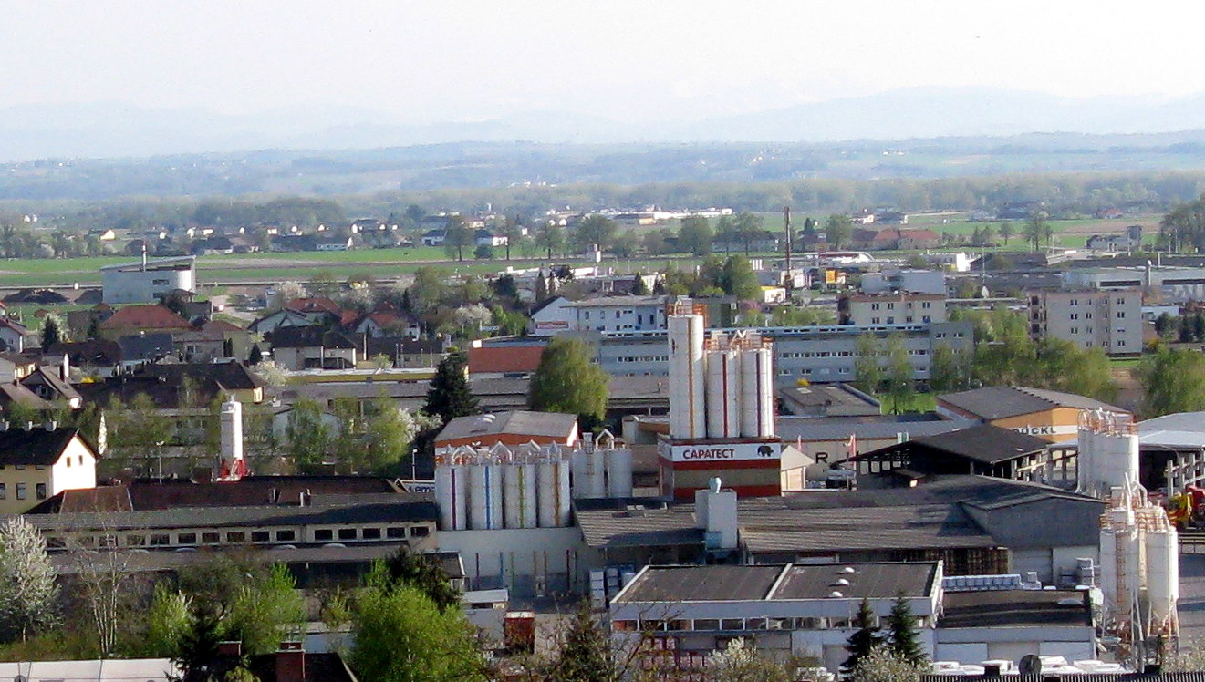 Firmengelände der Capatect Baustoffindustrie in Perg